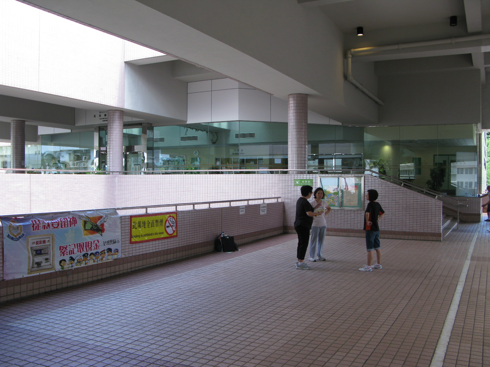 中文（香港）: 香港荃灣荃景圍體育館健體廊